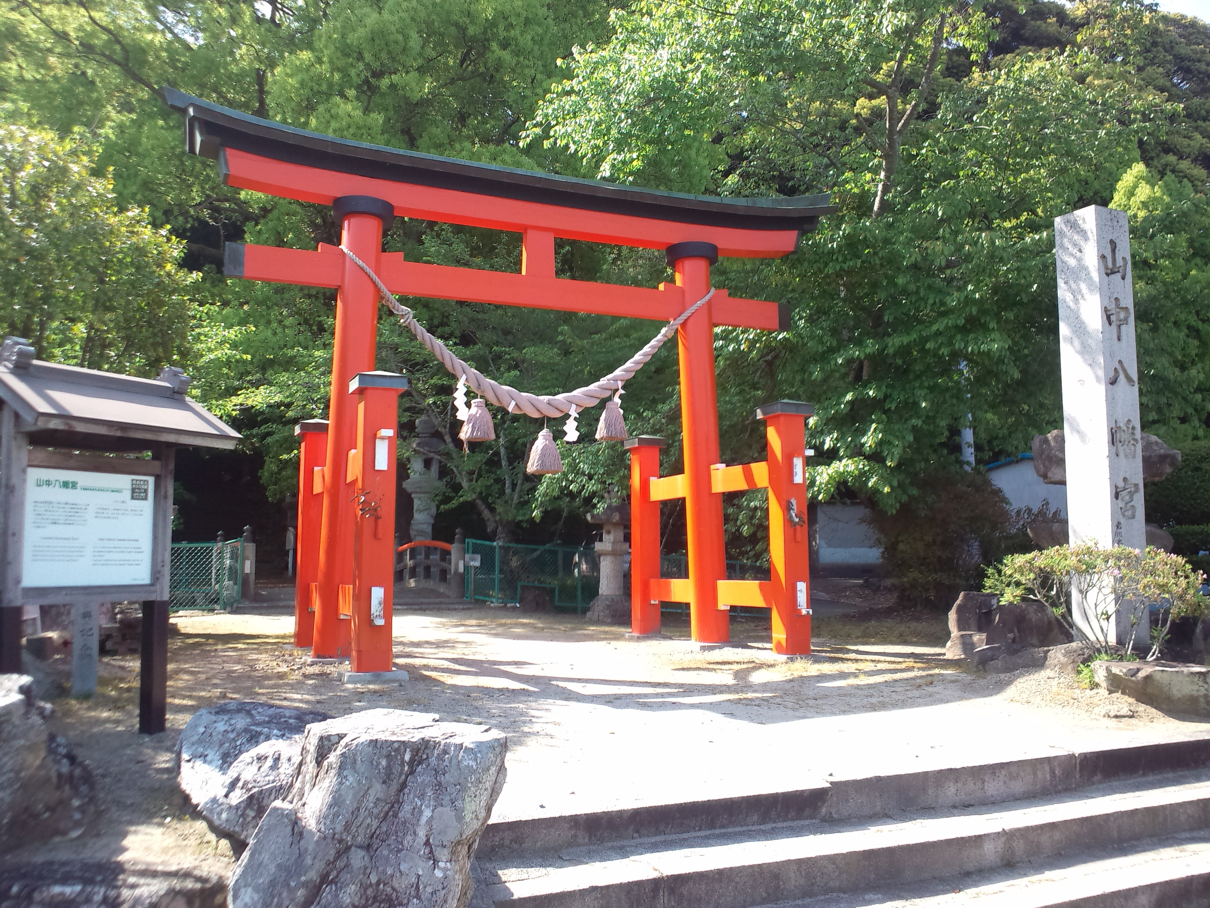 山中八幡宮 入口の鳥居